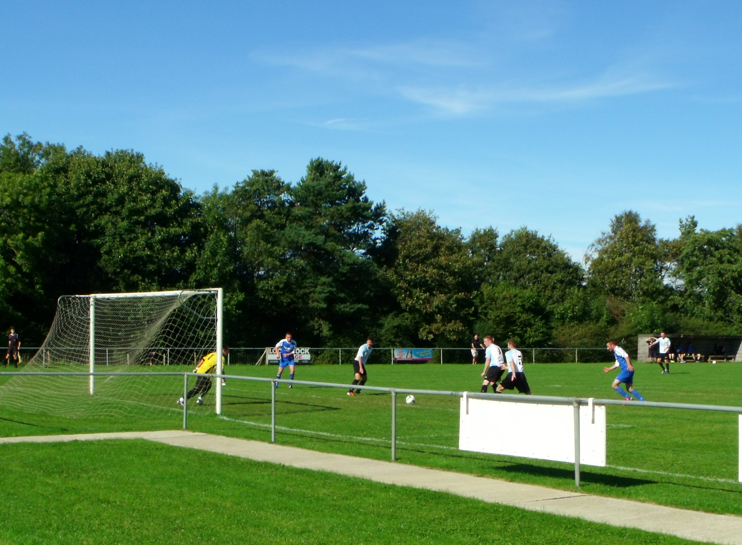 Llanfairpwll. FC v Nefyn Town